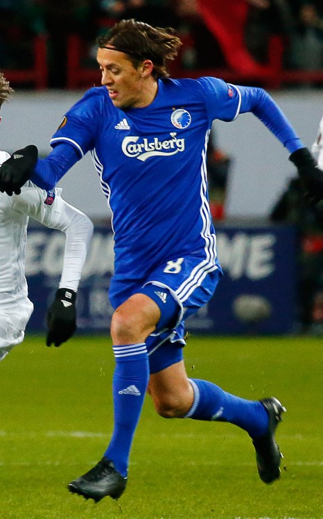 Uroš Matić